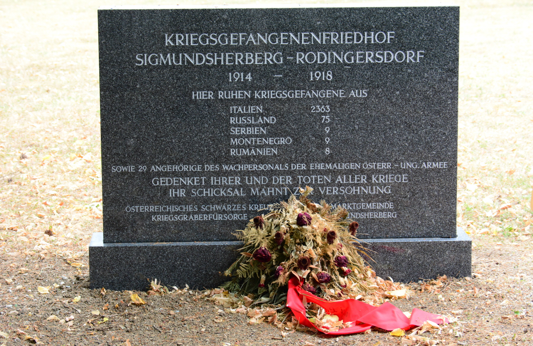 Der Soldatenfriedhof Sigmundsherberg war Bestandteil des Kriegsgefangenenlagers Sigmundsherberg in Niederösterreich. Der Gedenkstein am Eingangstor wurde 2015 neu aufgestellt.